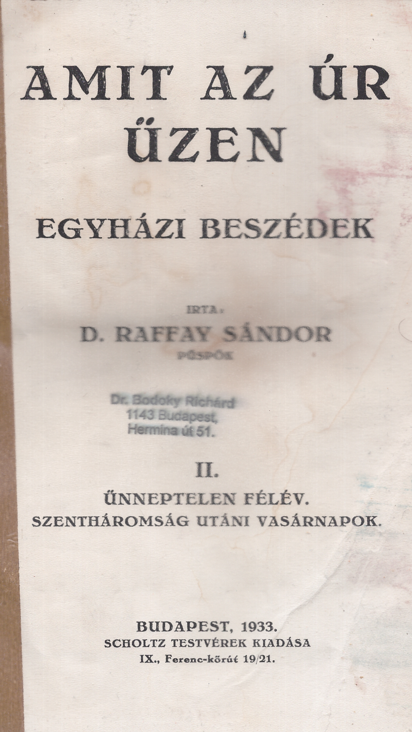 Raffay Sándor (1866-1947): Amit az úr üzen. Egyházi beszédek II. kötet (saját készítésű kép)